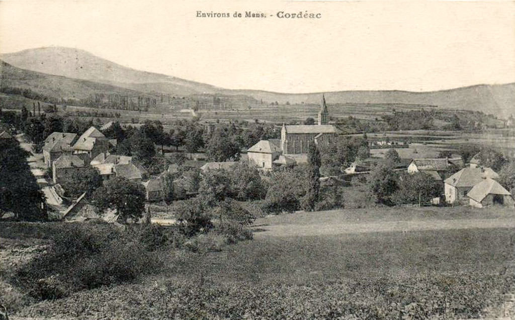 Cordéac carte postale ancienne